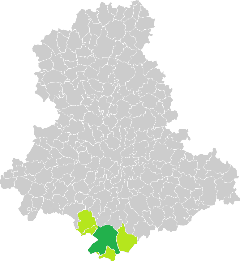 Carte de situation de la commune de Saint-Yrieix-la-Perche (en vert foncé) dans le votre Canton (en vert clair) sur une carte des communes de la Haute-Vienne